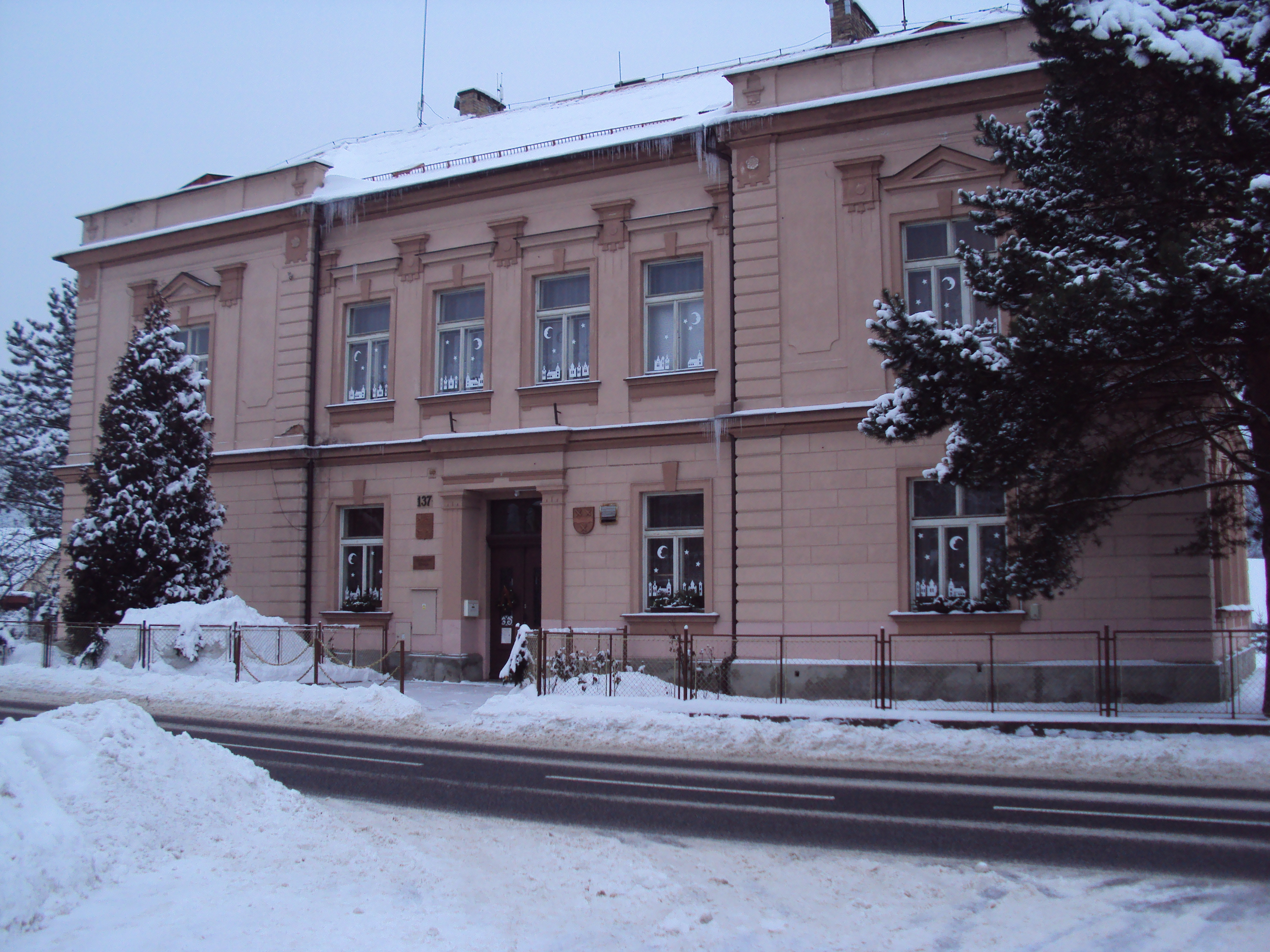 Budova základní školy v Jezvé